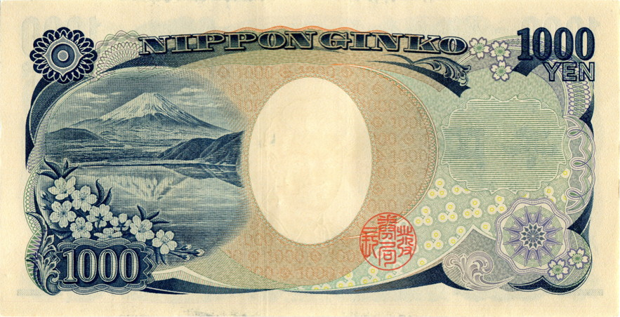 Series E 1000 Yen Bank of Japan note. Cherry blossom, Lake Motosu and Mt. Fuji. First issued in 2004. 150mm x76mm.